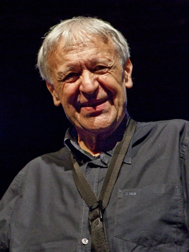 Michel Portal à Dortmund, Domicil